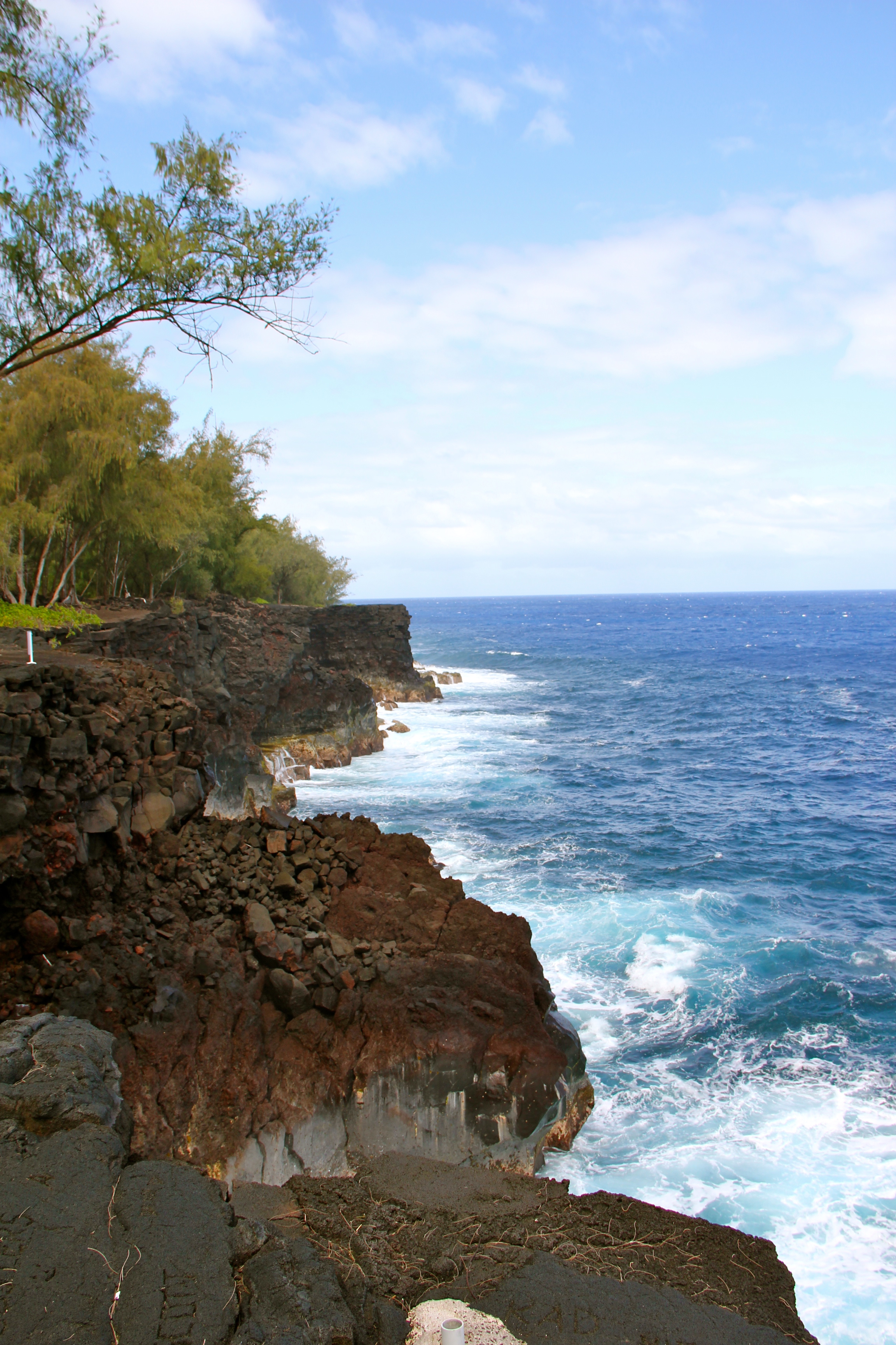 Lava cliff, MacKenzie State Park, Hawai‘i